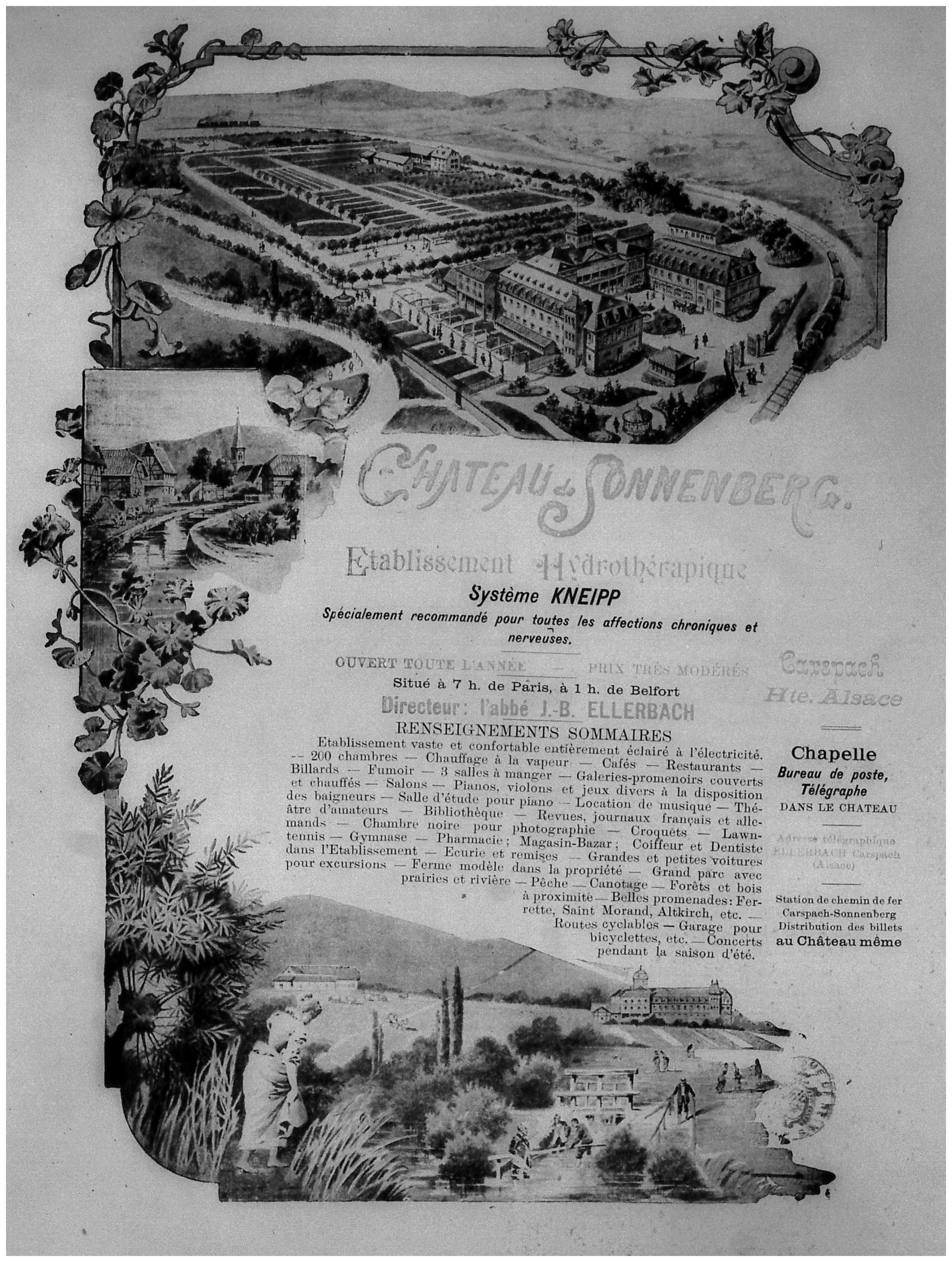 vue de l'Ancien château utilisé comme centre thermal.